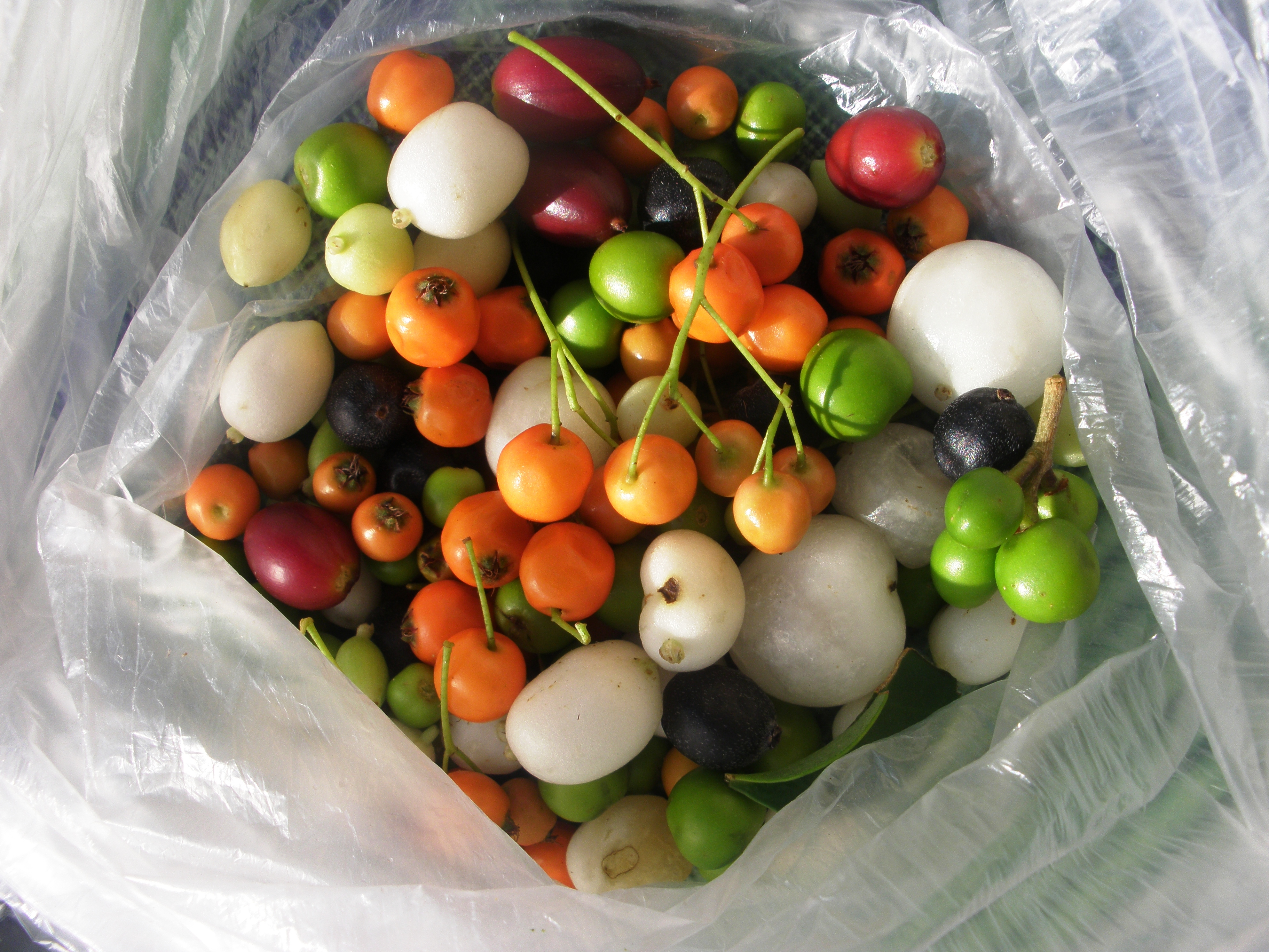 Voorhout, september 2012